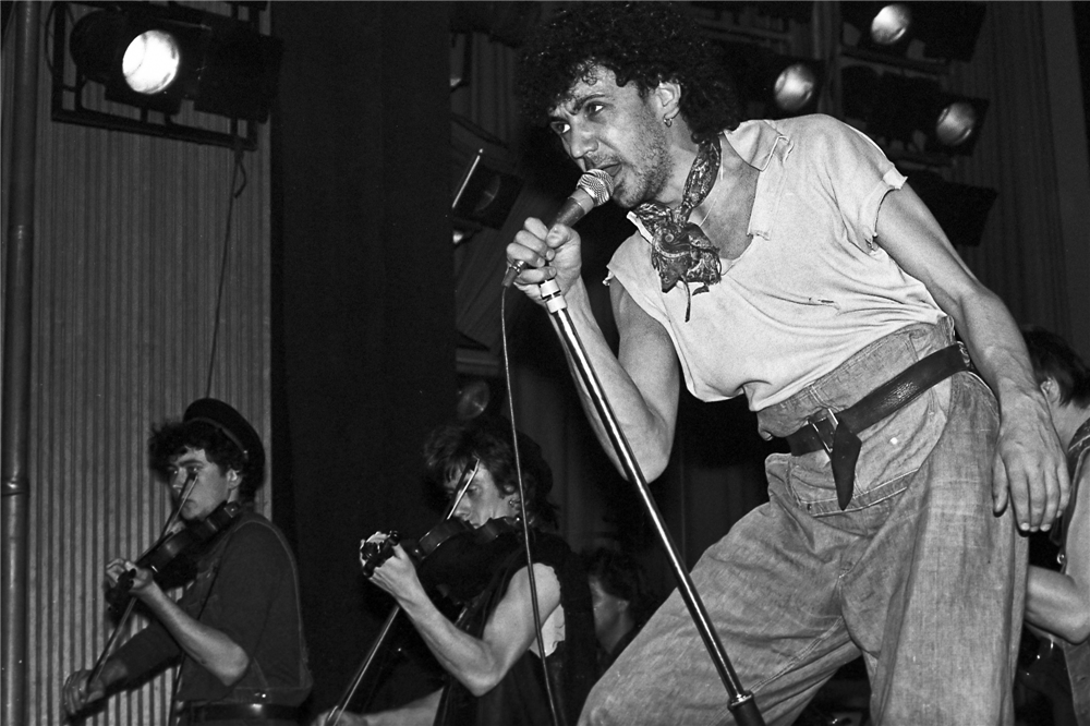 Dexys Midnight Runners en concert à Zürich en 1982.